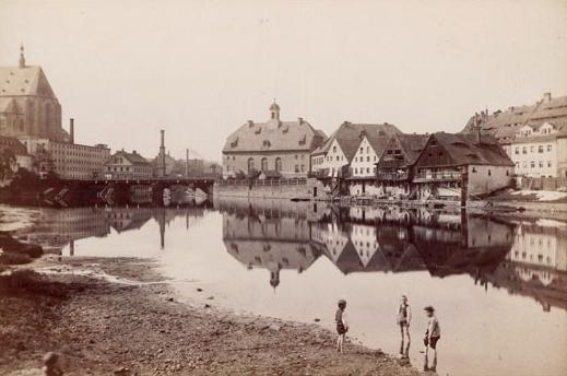 Robert Scholz: Görlitz Blick zur Heiligen Geist Kirche